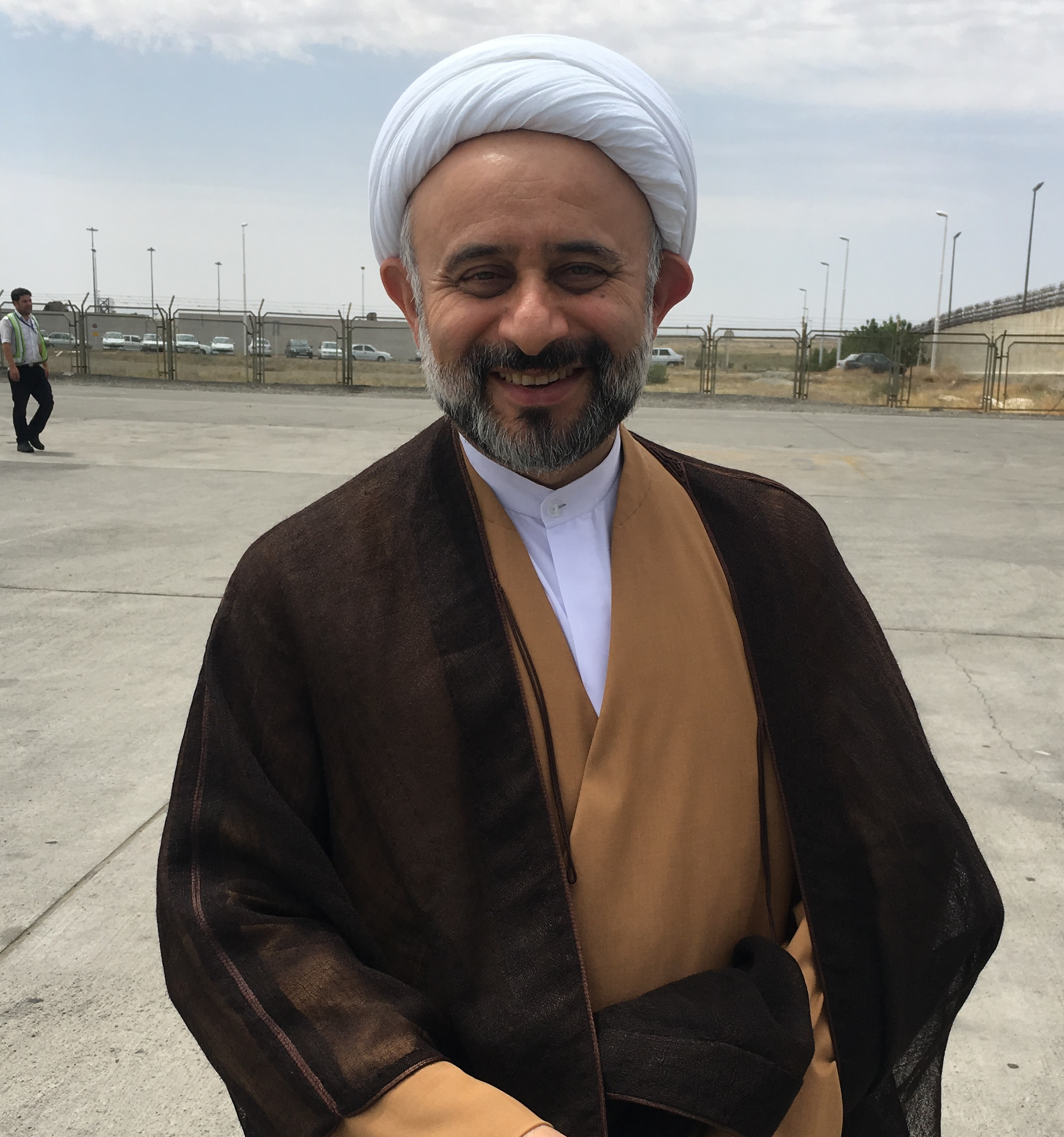 ناصر نقویان سیاستمدار و روحانی ایرانی